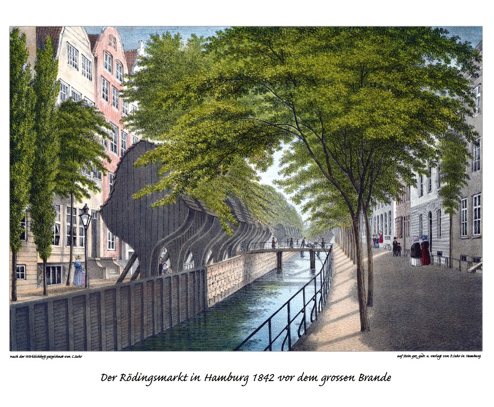 Der Rödingsmarkt in Hamburg 1842 vor dem grossen Brande, gezeichnet von Christoffer Suhr, Litho von Peter Suhr